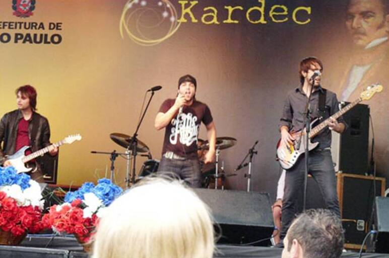 Festival "Allan Kardec" avec fête "typiquement française". Sao Paulo, Brésil, avril 2010